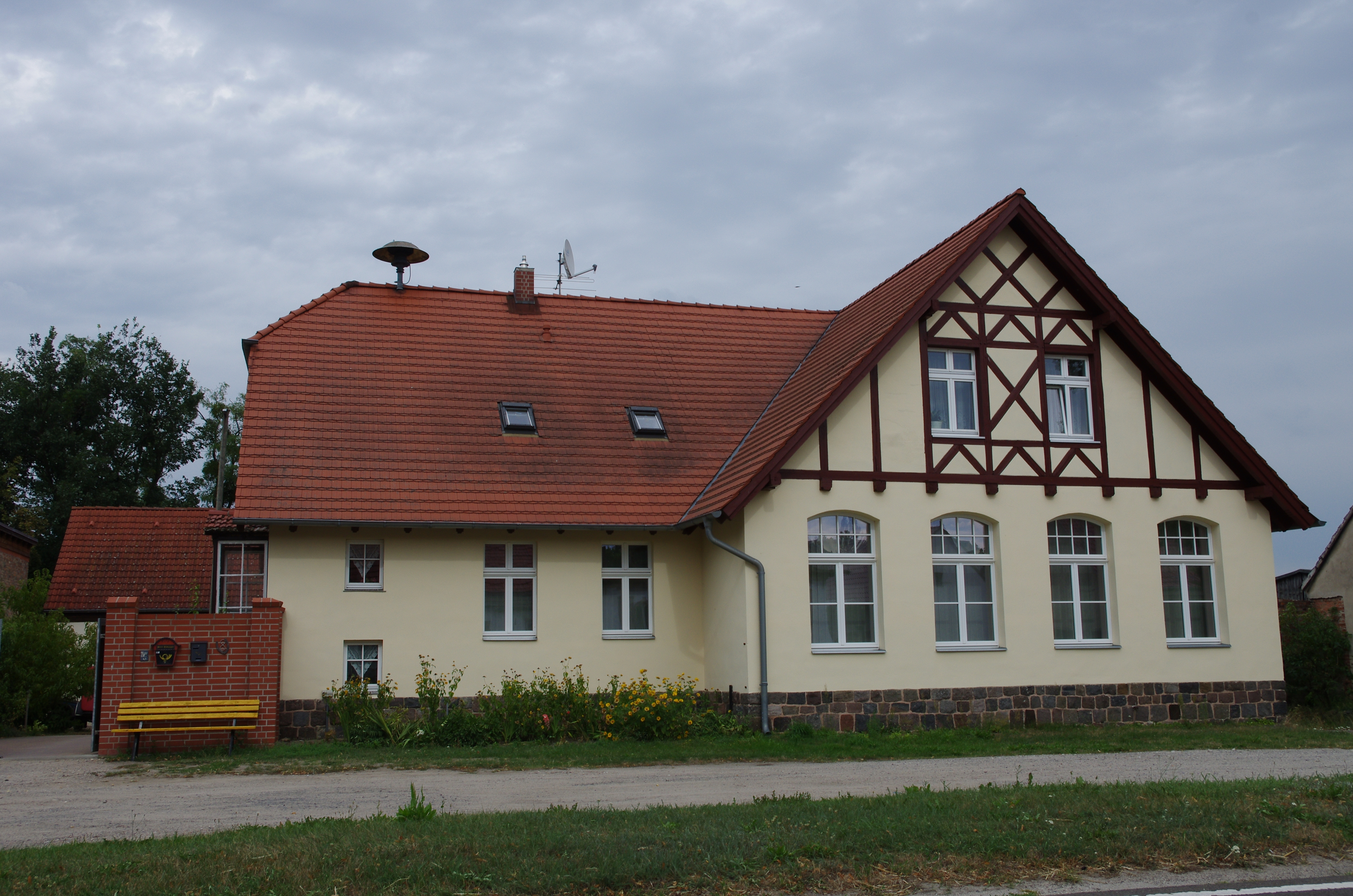 Wriezen in Brandenburg. Das Haus in der Straße Rathsdorf 8 steht unter Denkmalschutz.